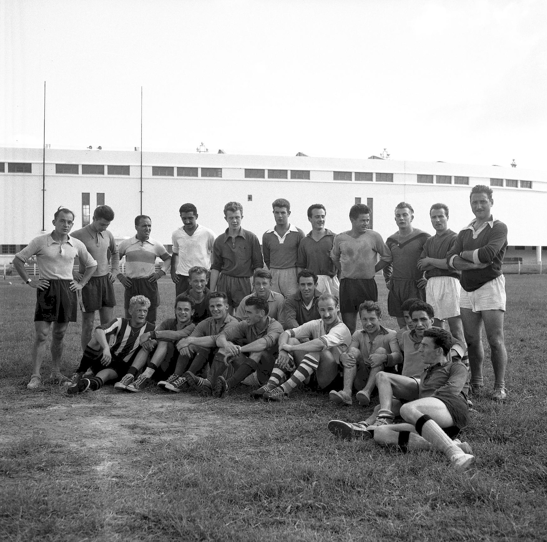 Stadium municipal de Toulouse, 1bis allées Gabriel-Biénès. 23-24 Août 1956. Vue de l'effectif du Toulouse Football Club, après un entraînement, sur une pelouse près du Stadium. Observation: Négatif du tirage contact 53Fi6392.